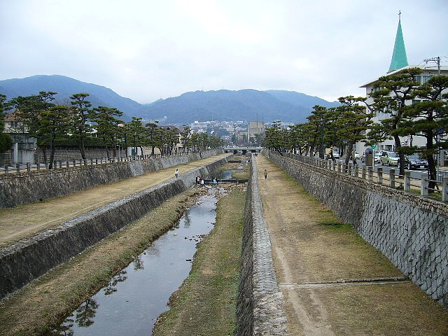 芦屋川 公光橋から北望